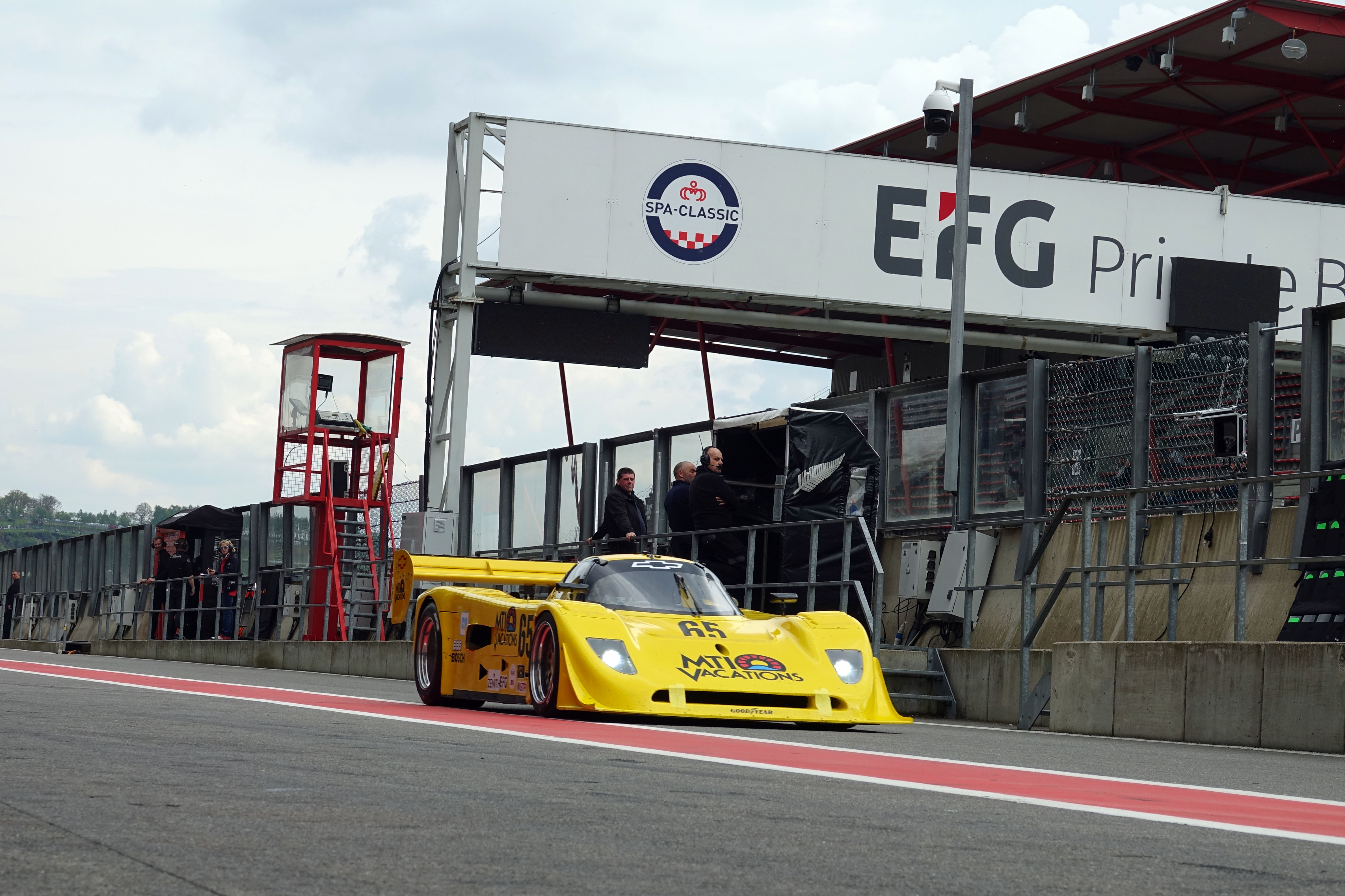 Spa Classic 2019 - Groupe C